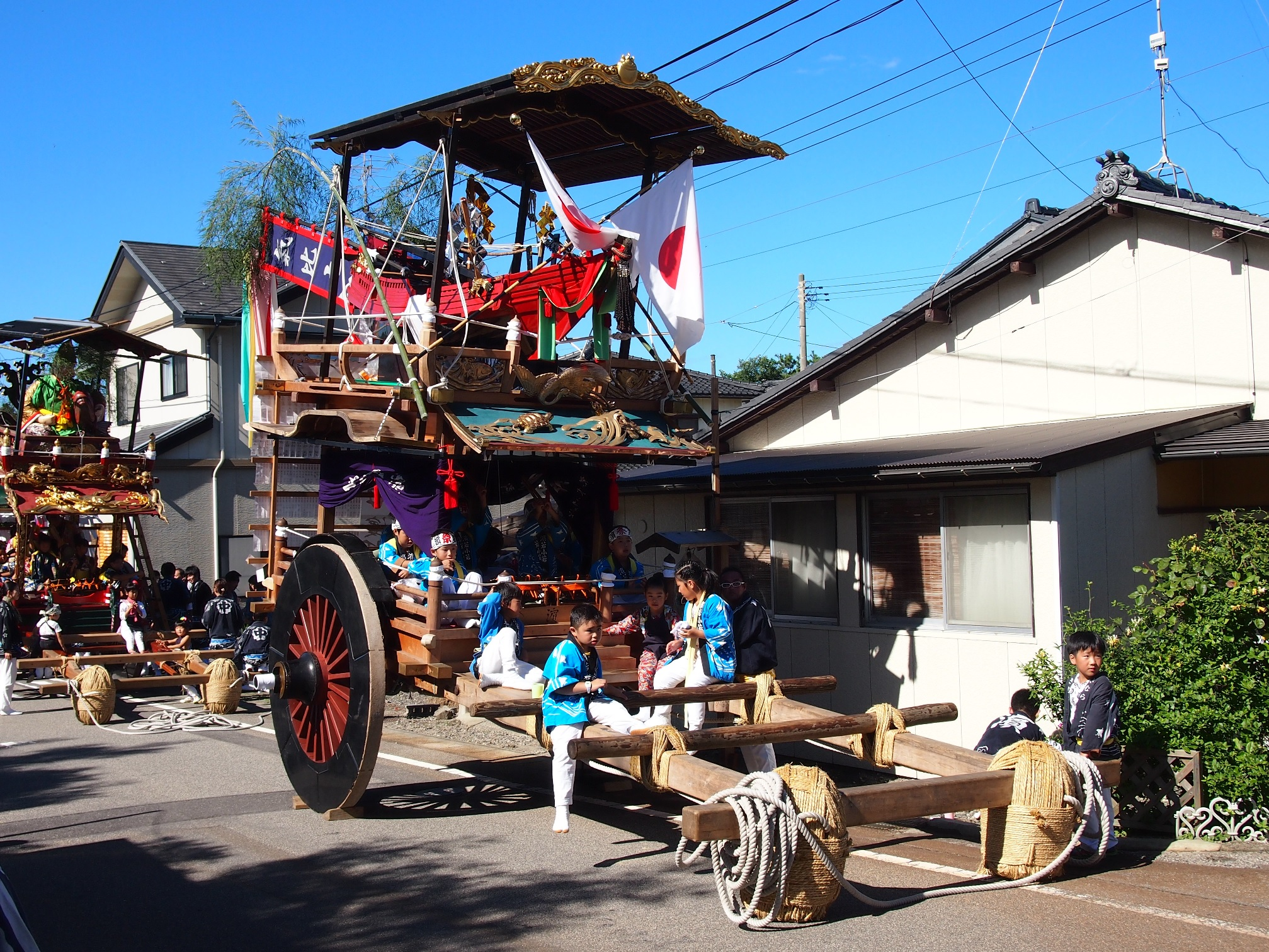 浜町おしゃぎり（氣比丸）